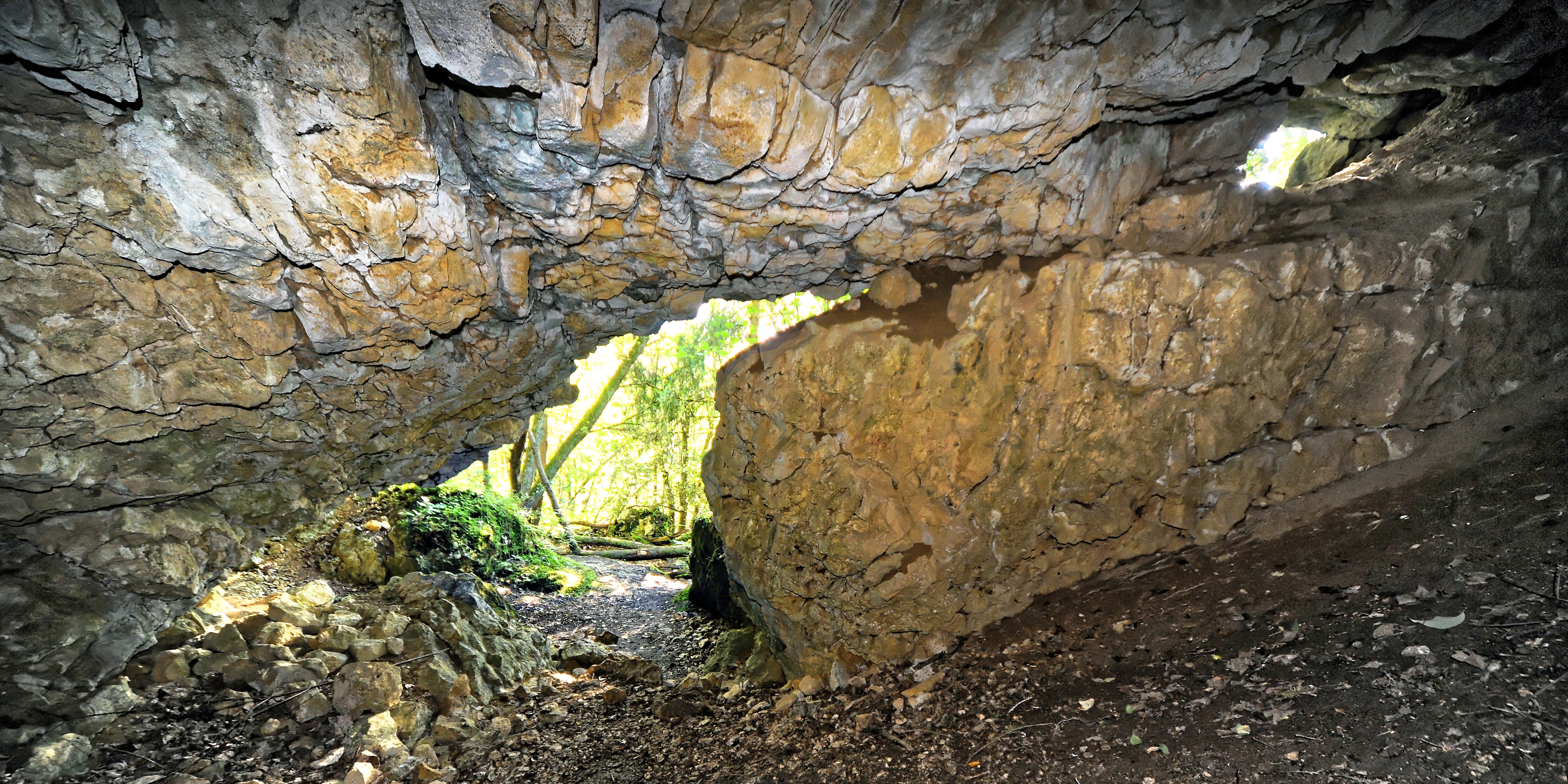 Die Bocksteinhöhle wurde in das Welterbe aufgenommen.